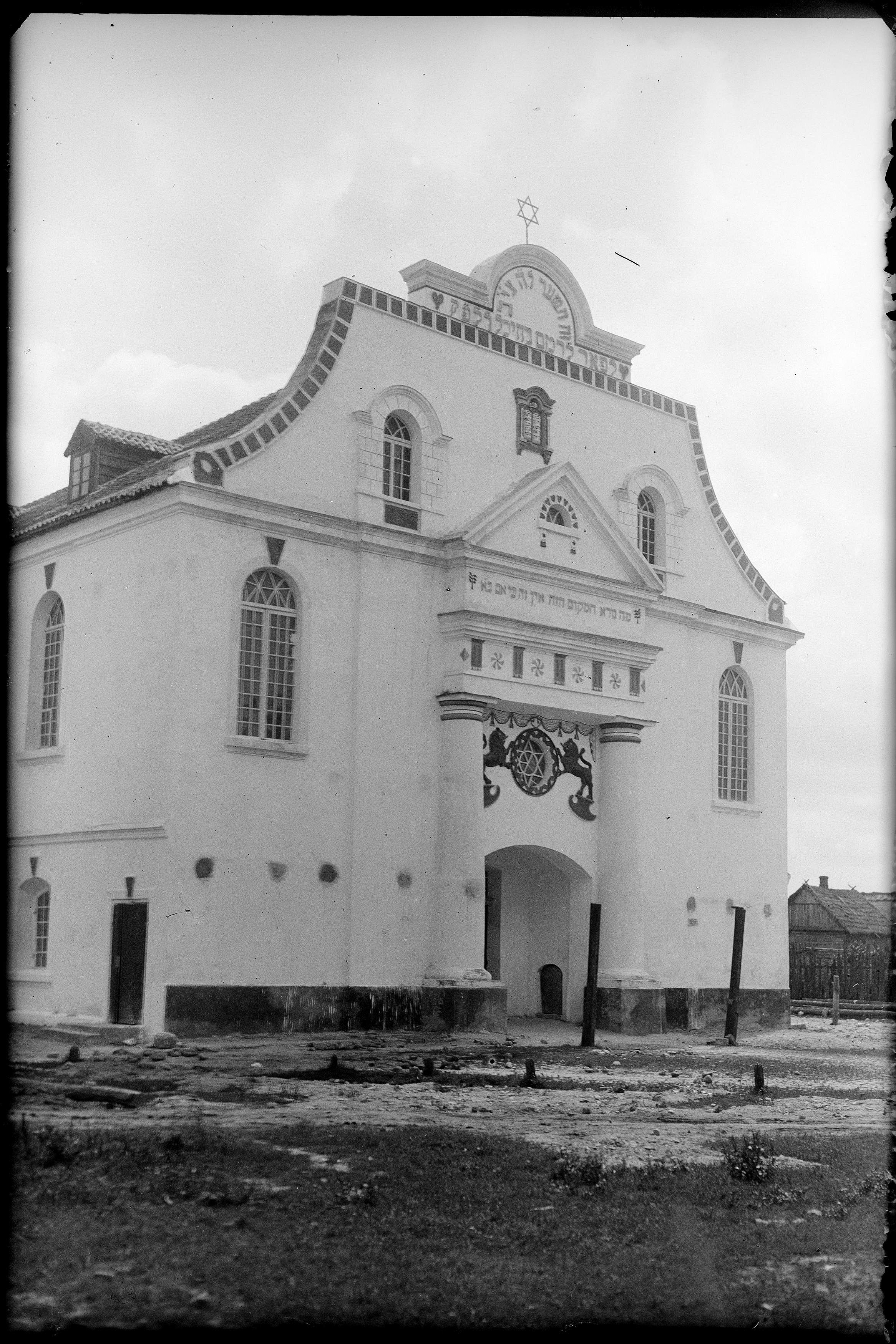 Synagoga w Orli